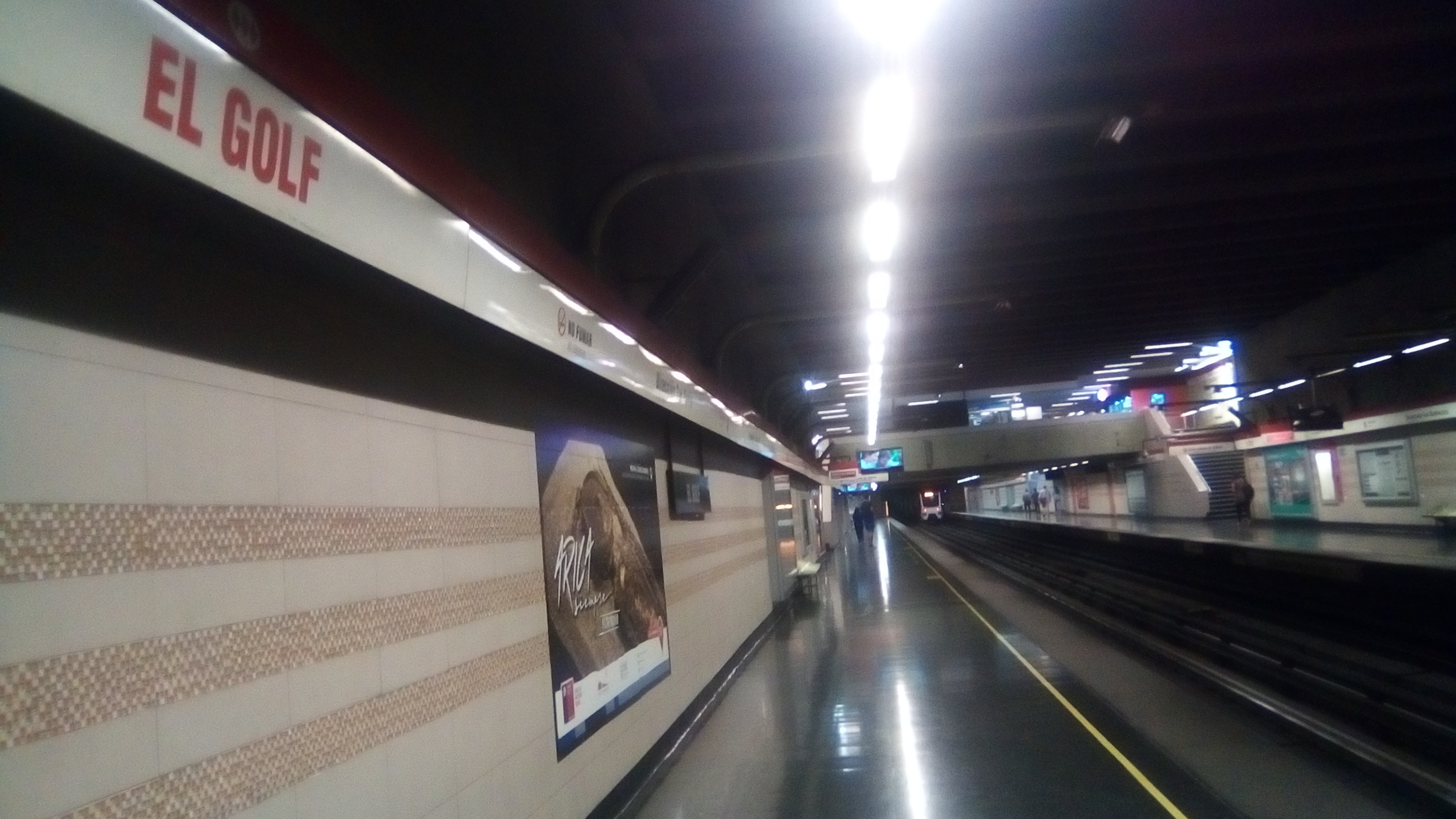 Estación EL Golf (2018)